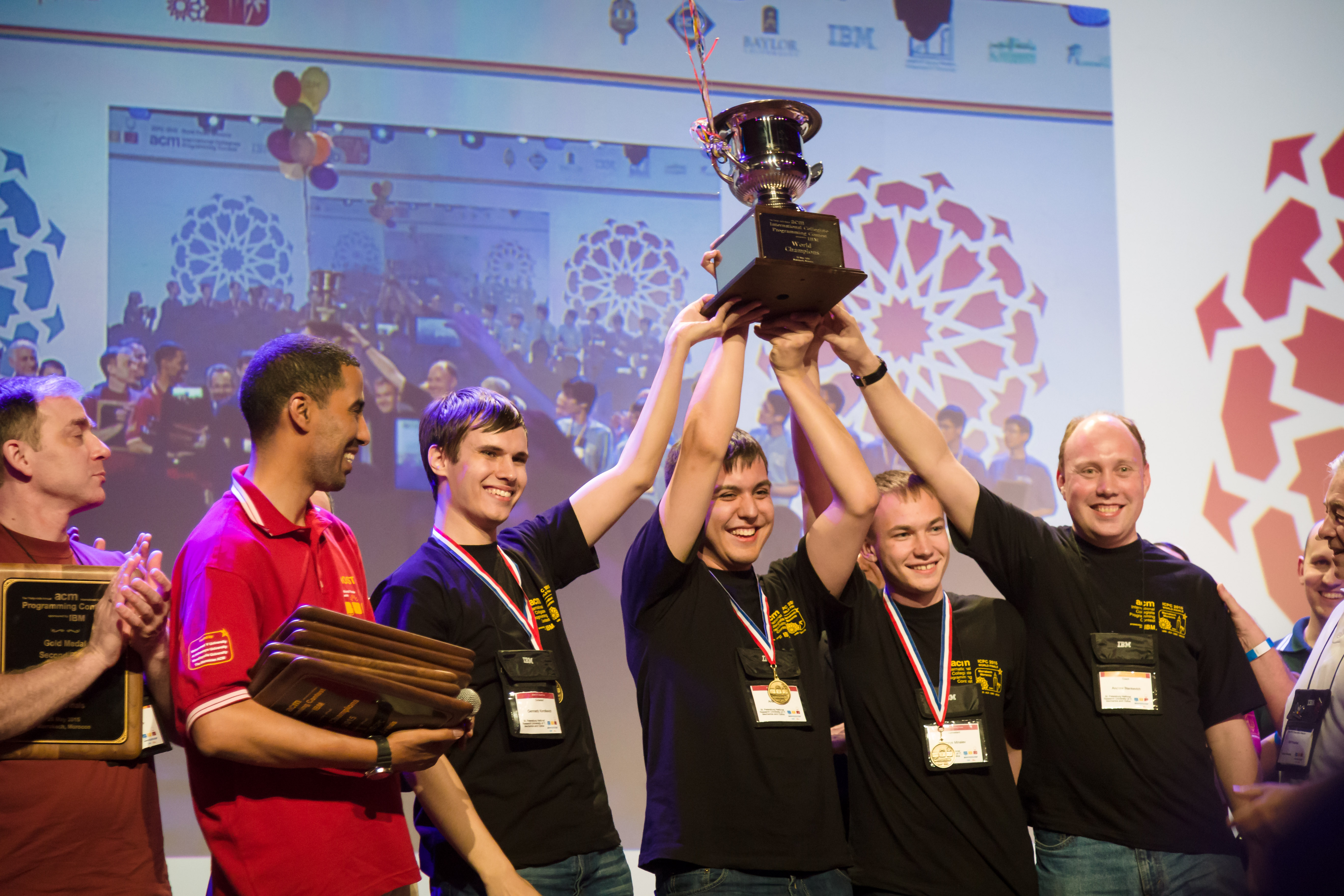 Команда Университета ИТМО, победители Чемпионата мира по программированию, 2015